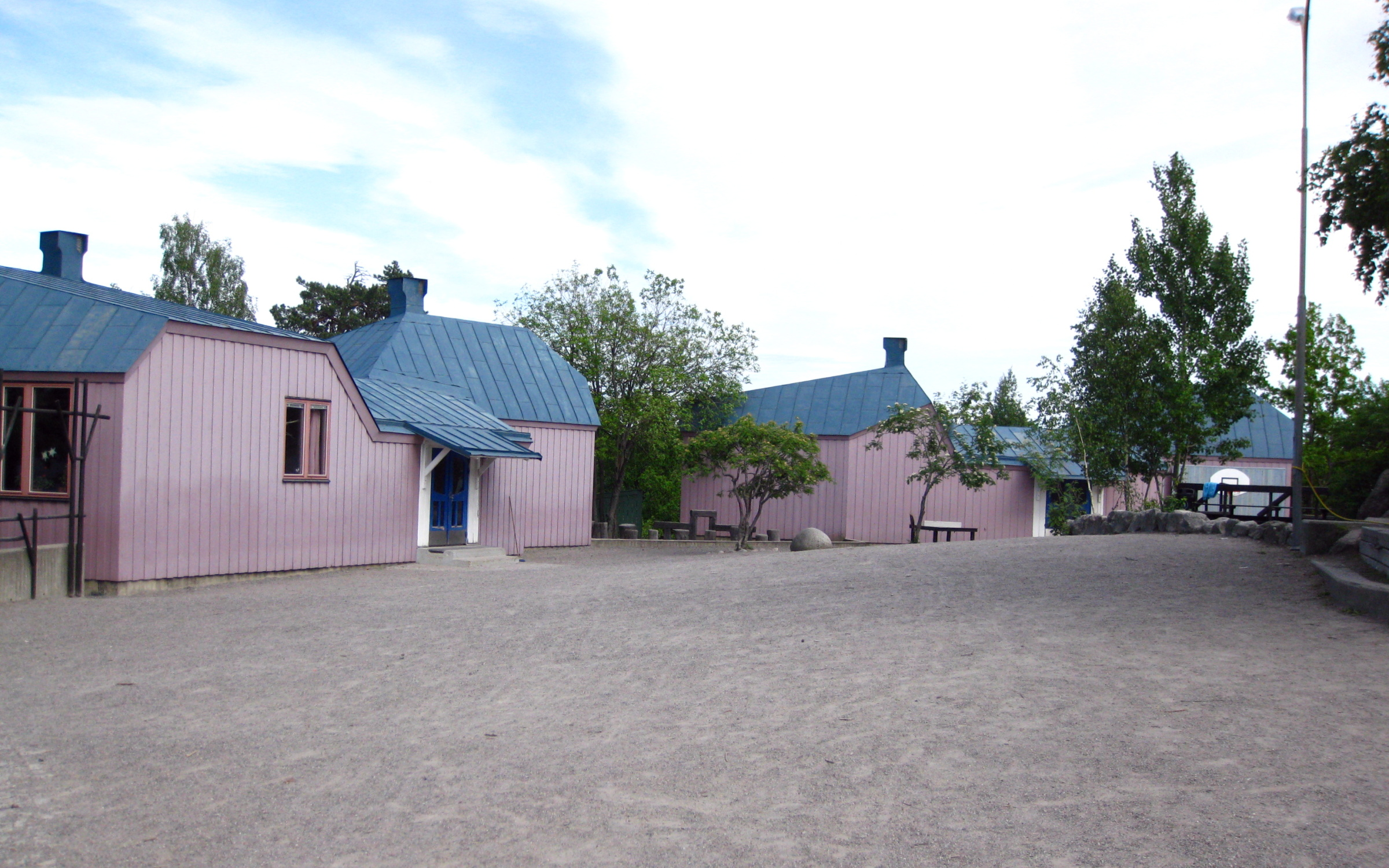 Kristofferskolan, Åkeslund, Bromma, västra Stockholm